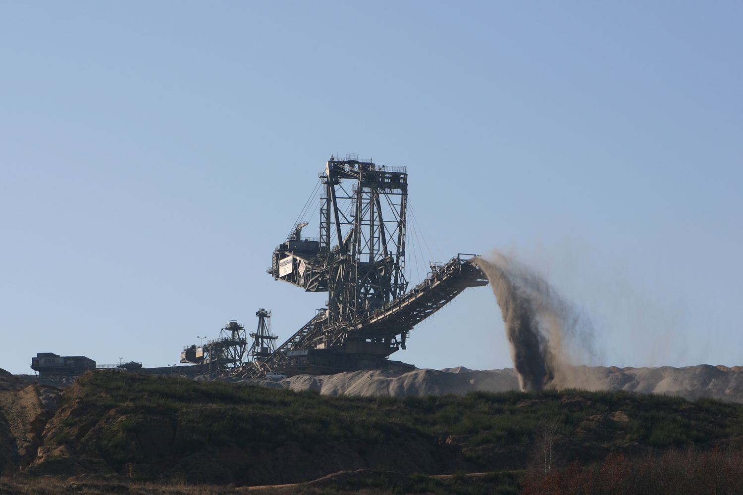 Absetzer 757 auf der Sophienhöhe